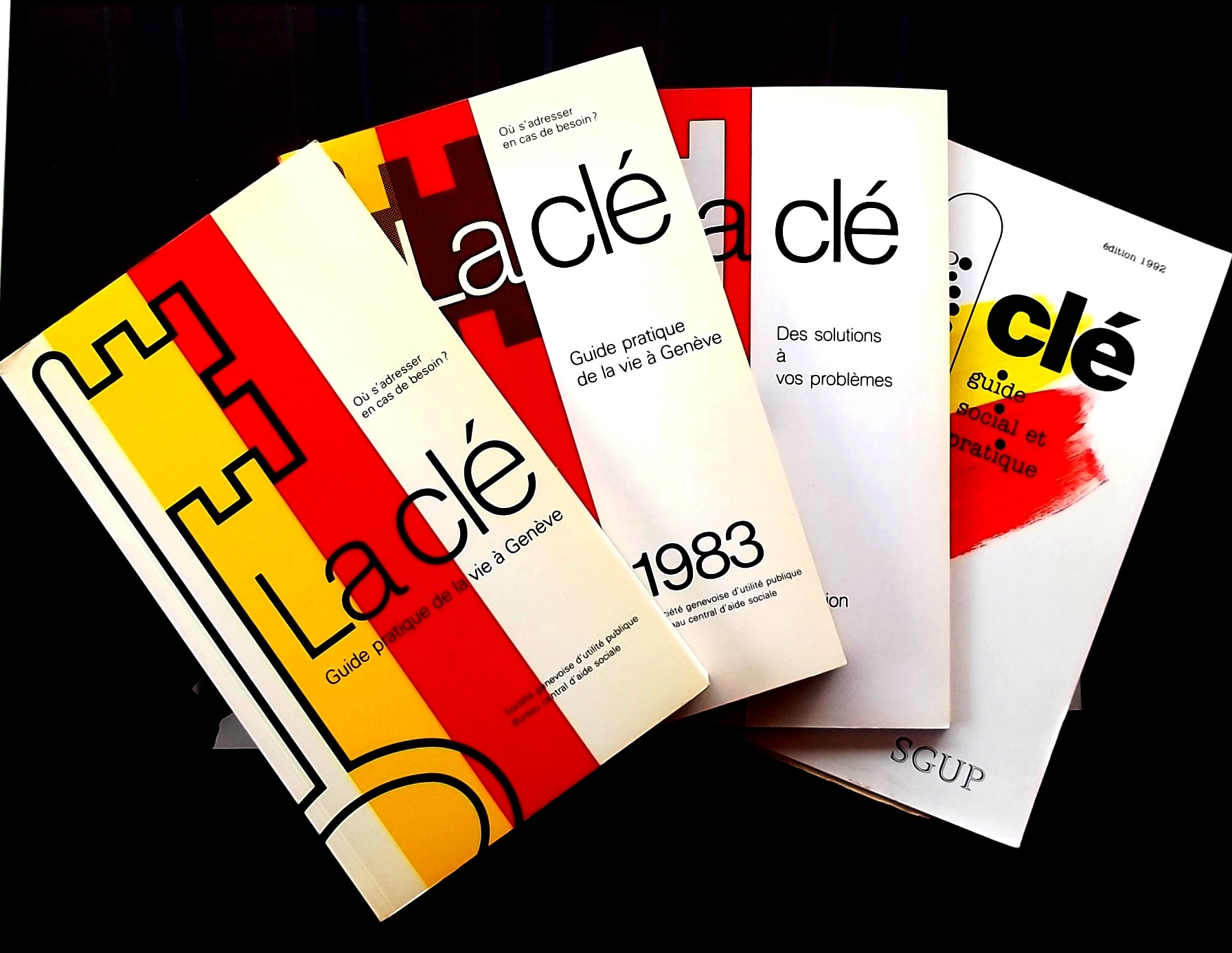 La Clé éditée par la SGUP en 1981, 1983, 1988 et 1992. Cette dernière édition est en collaboration avec l'Hospice général de Genève qui gèrera les éditions suivantes.